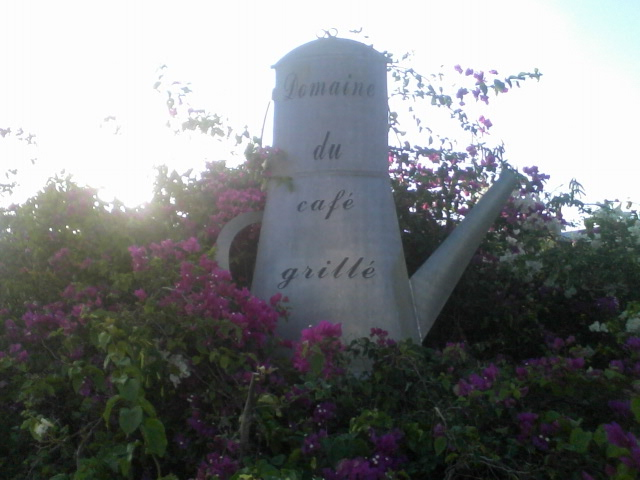 Entrée du jardin